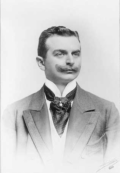 Bedřich Deym ze Stříteže (1866 - 1929), Český šlechtic a politik.